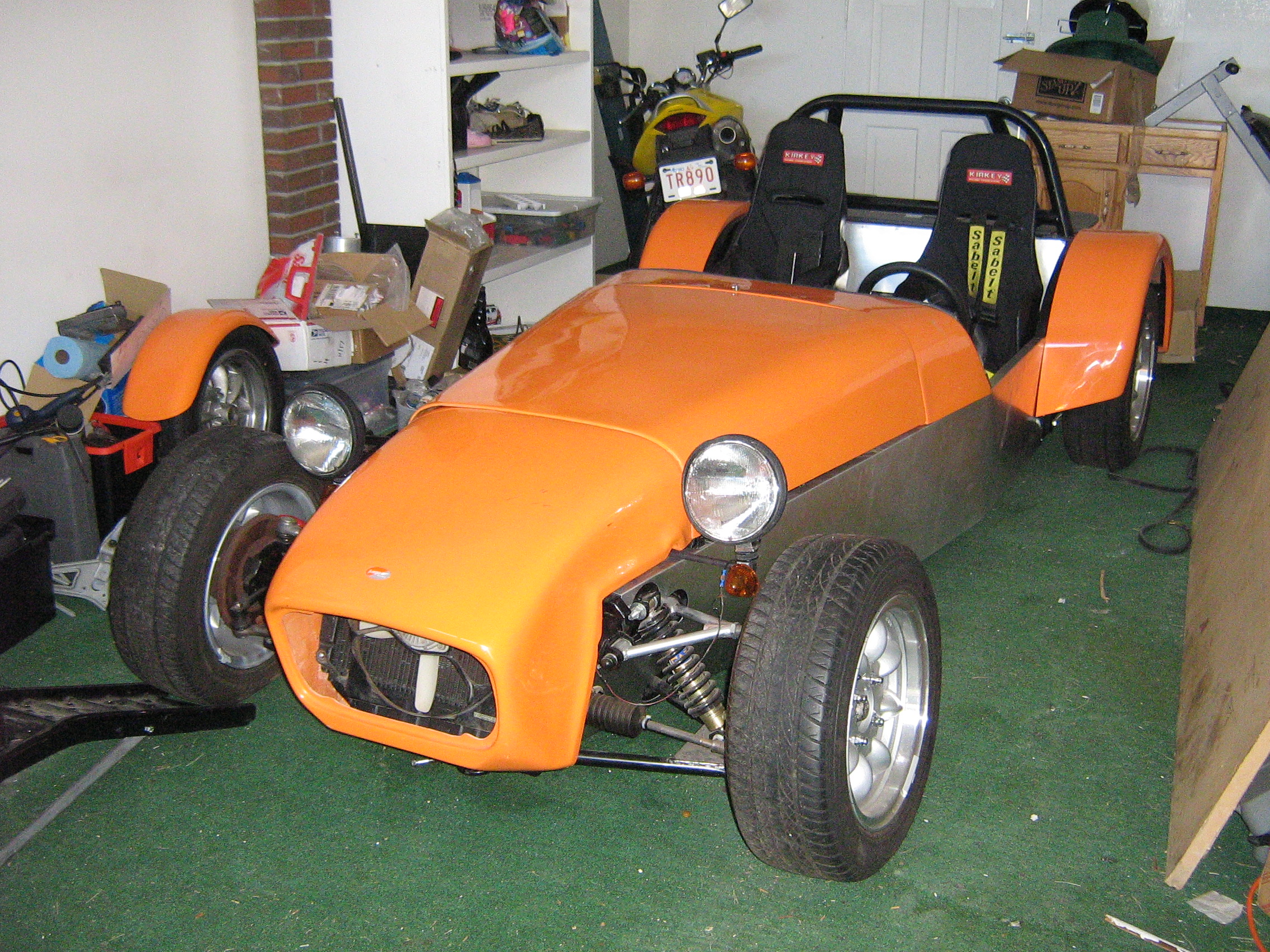 Seven Build